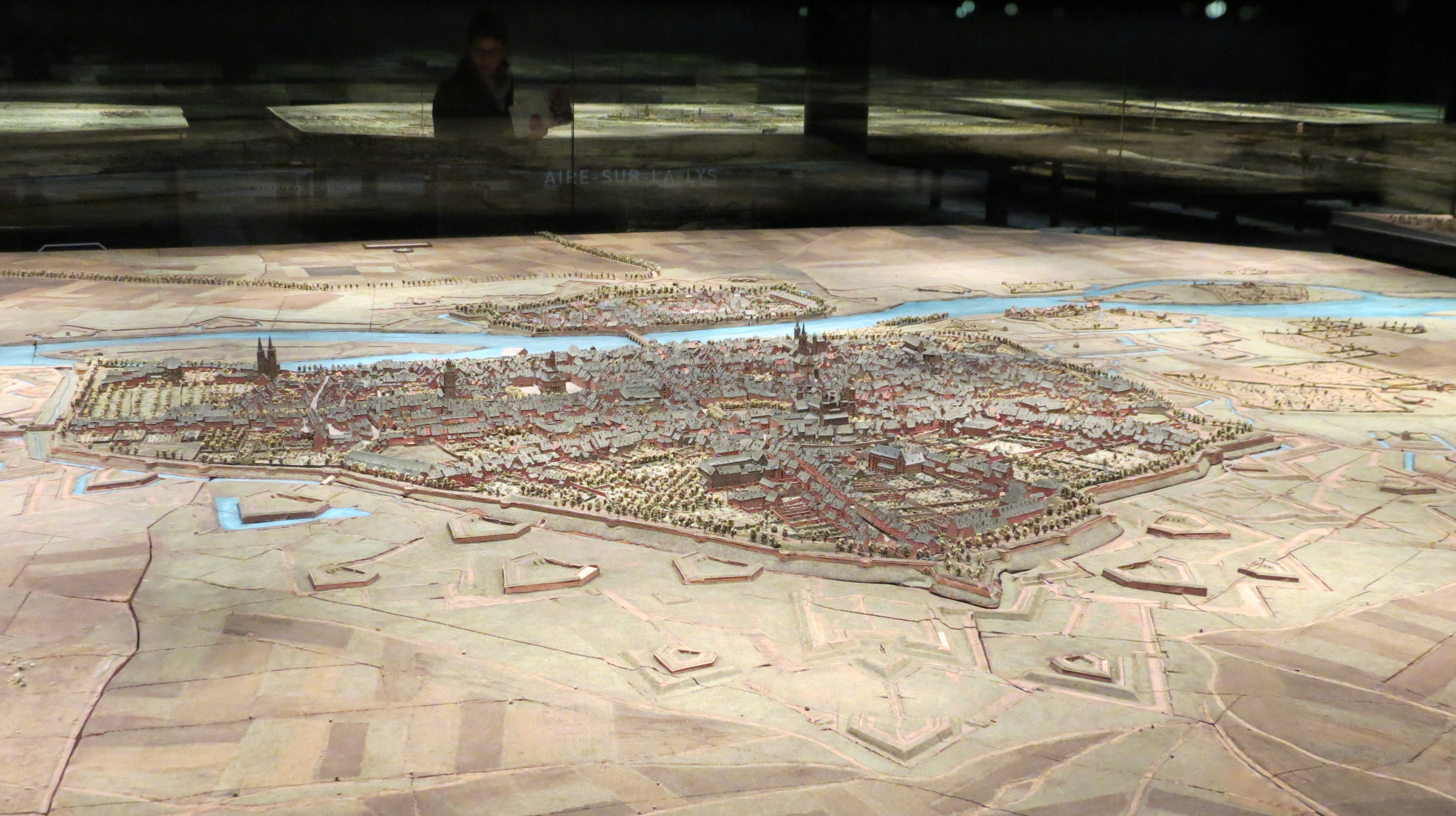 Plan Relief 02 Maastricht 1 PBA Lille 2019